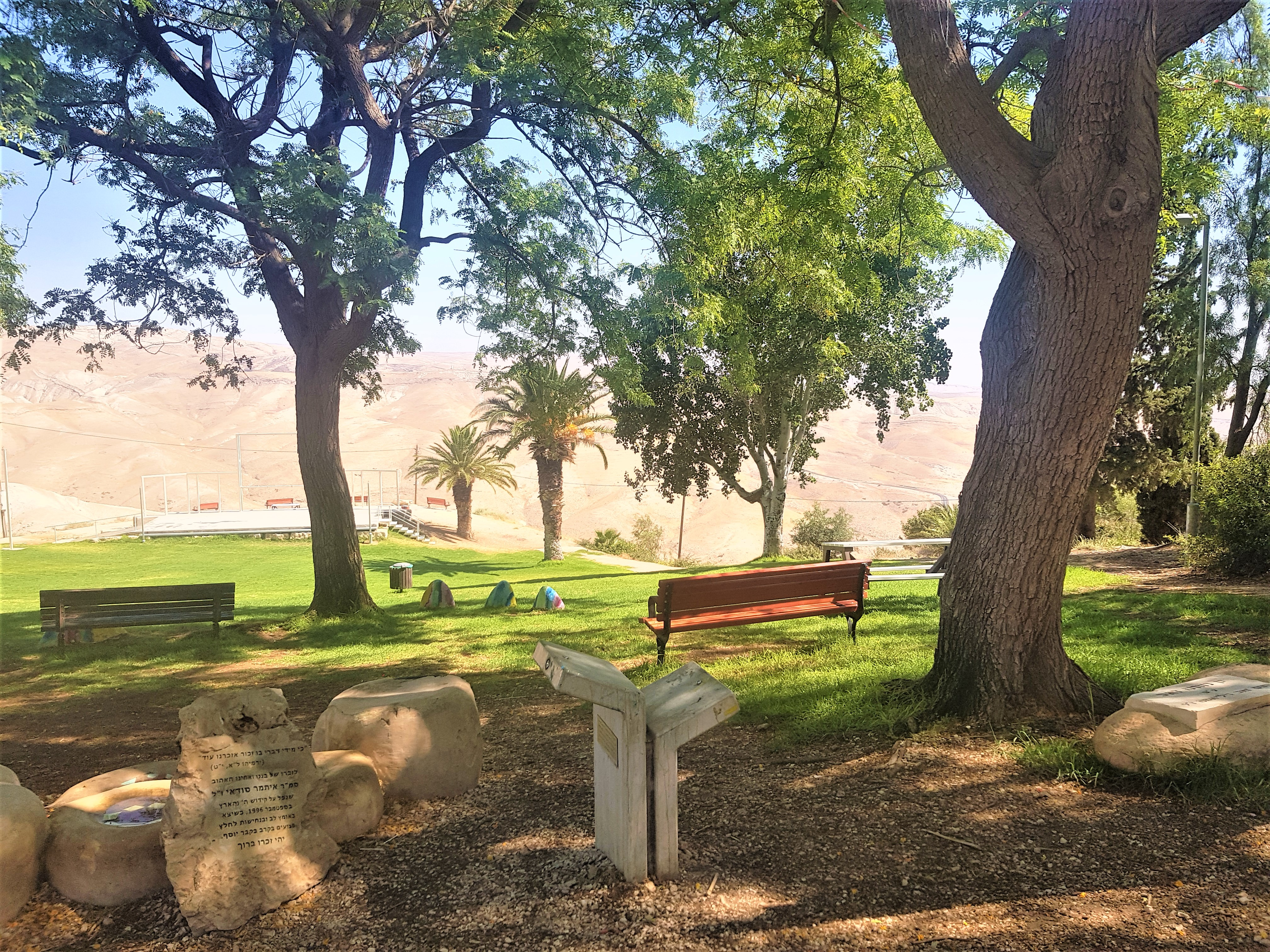 גן הצוק כפר אדומים